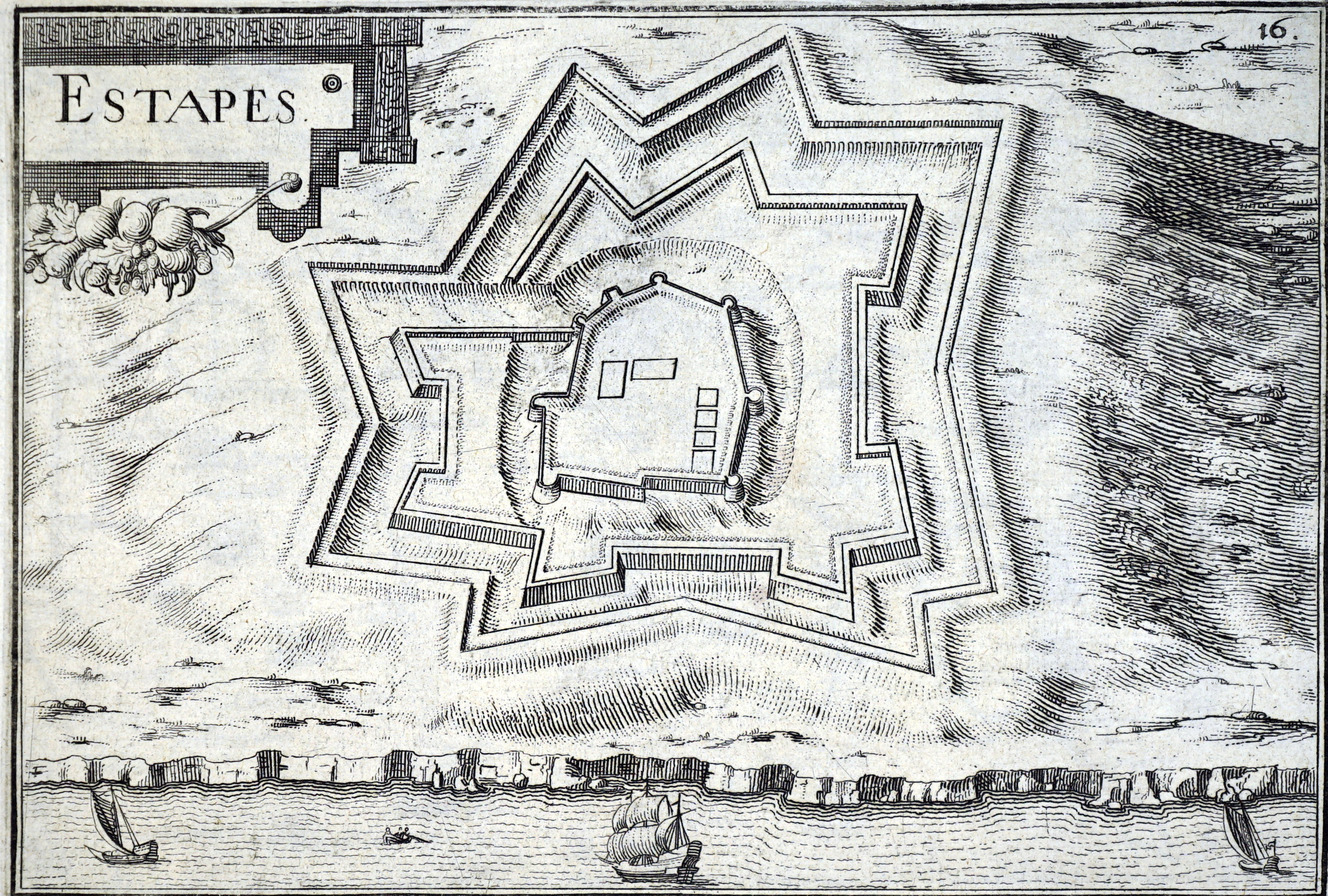 sur un dessin de Tassin.